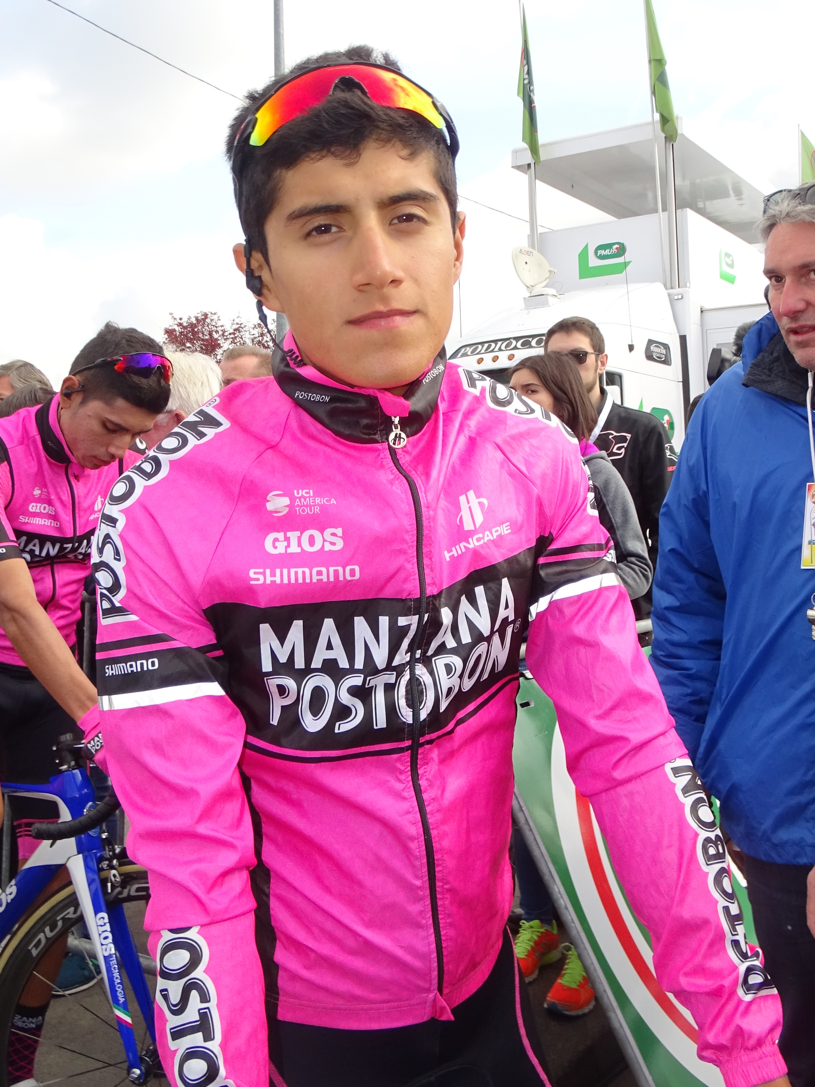 Reportage réalisé le jeudi 13 avril à l'occasion du départ et de l'arrivée du Grand Prix de Denain 2017 à Denain, Nord, Nord-Pas-de-Calais-Picardie, France.